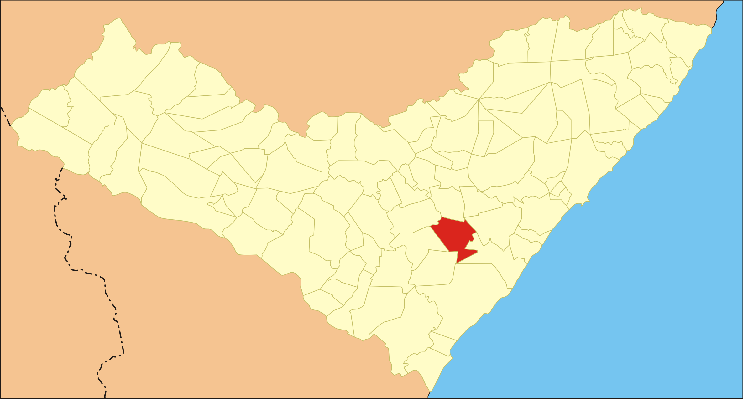 Localização da cidade em Alagoas